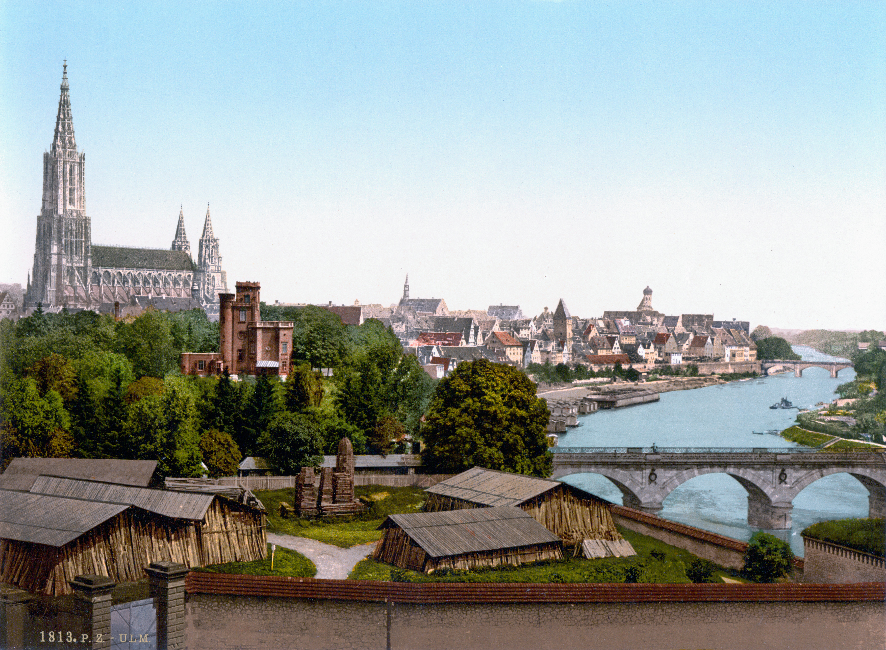 Ulm ca. 1894 bis ca. 1900